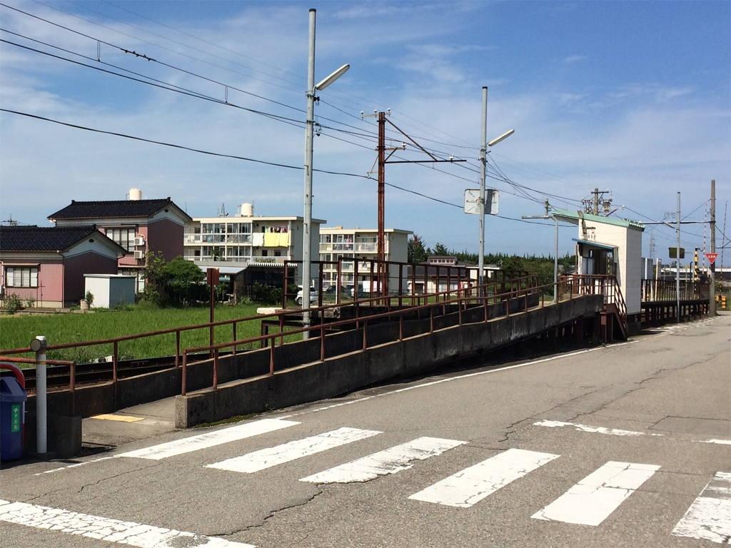 富山地方鉄道本線新宮川駅入口